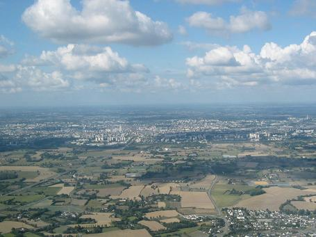 Photo aérienne de Rennes (Ille-et-Vilaine, France).